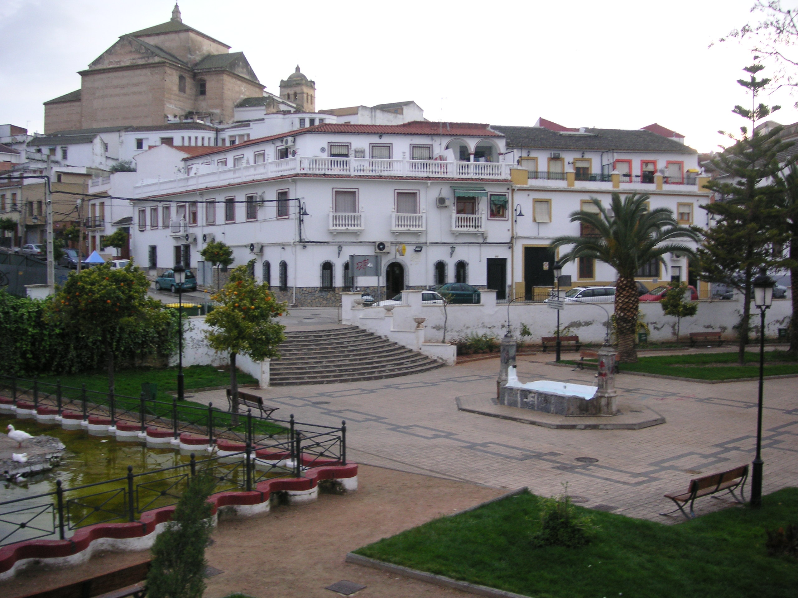 Fernán Núñez (Córdoba): Llano de Las Fuentes, al fondo Iglesia de Santa Marina